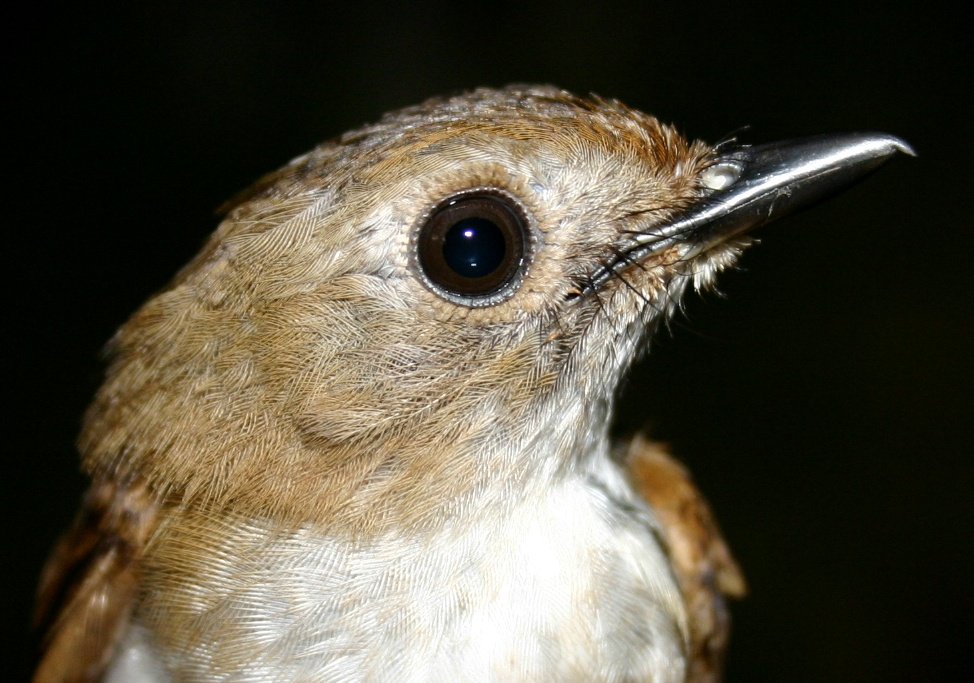 Ficedula basilanica